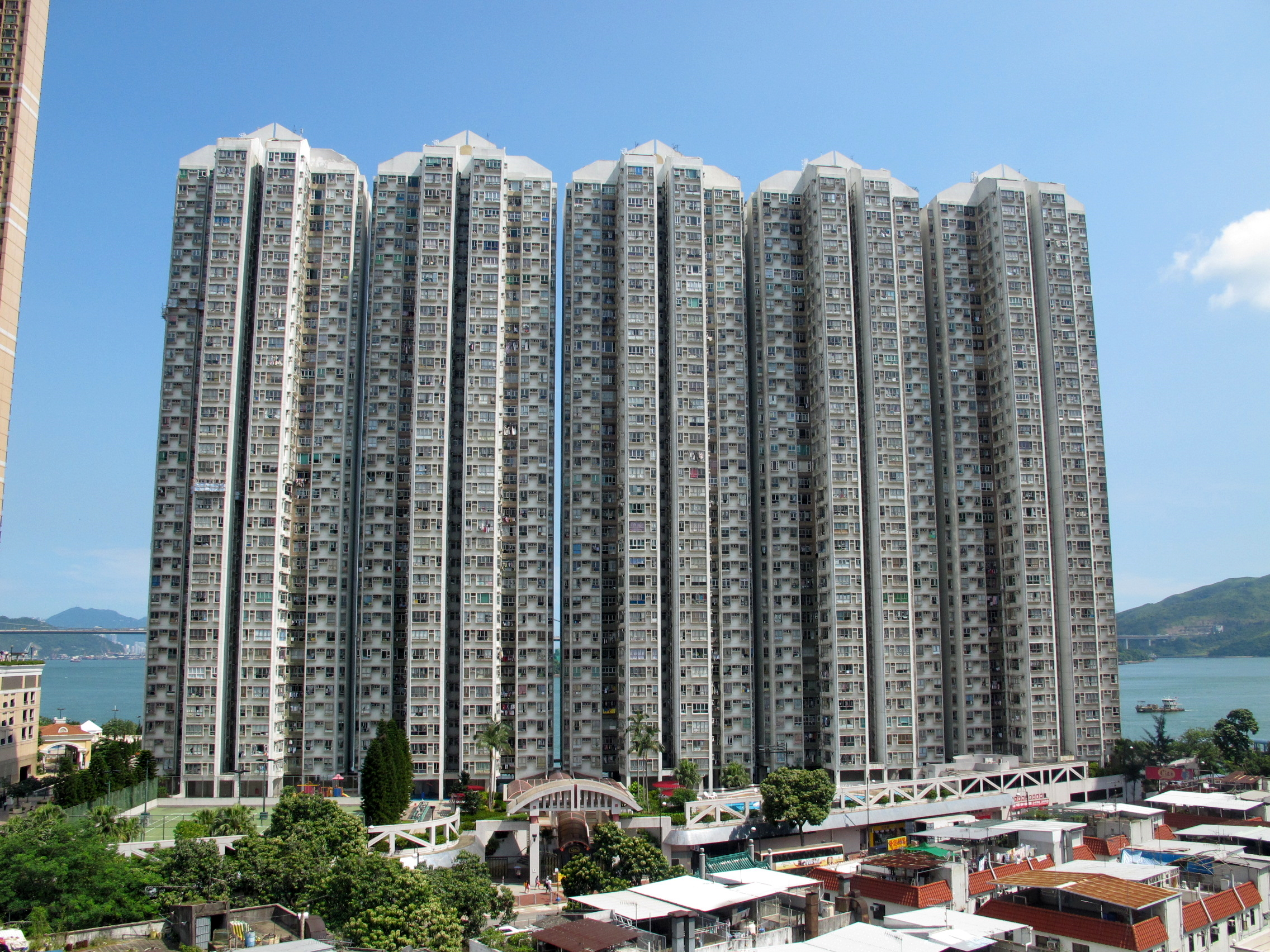 Lido Garden